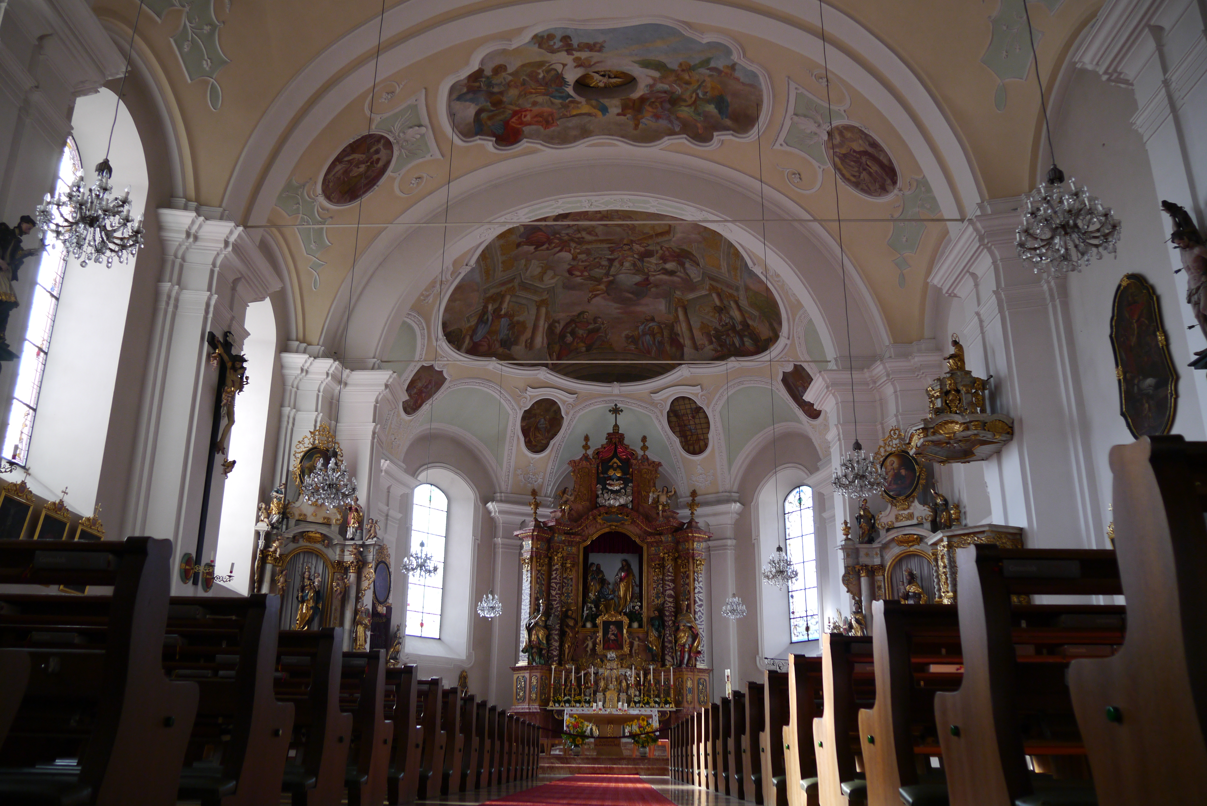 Kath. Pfarrkirche hl. Petrus, Breitenbach Innenraum